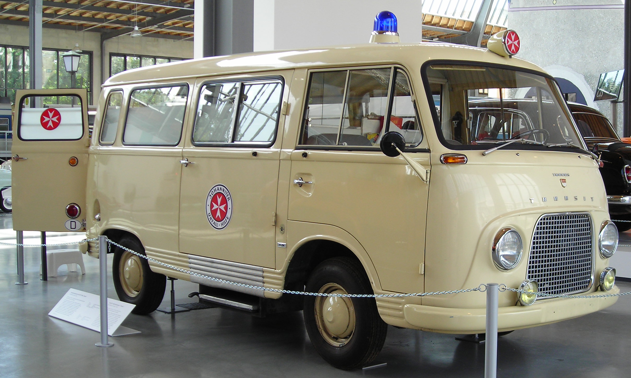 Ford FK 1000 „Transit“, Baujahr 1962, umgebaut zum Krankentransporter, verwendet von der Johanniter-Unfall-Hilfe Garching bei München. Exponat im Deutschen Museum Verkehrszentrum München, Halle I (Inv.-Nr. 2006-25)